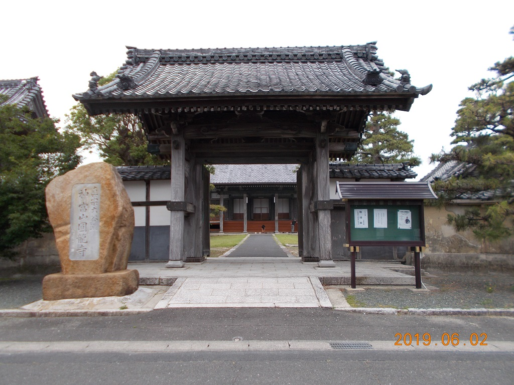 圓龍寺。豊橋市神野 (じんの)新田 (しんでん)町 (ちょう)字ツノ割30。山門正面から本堂を望む。